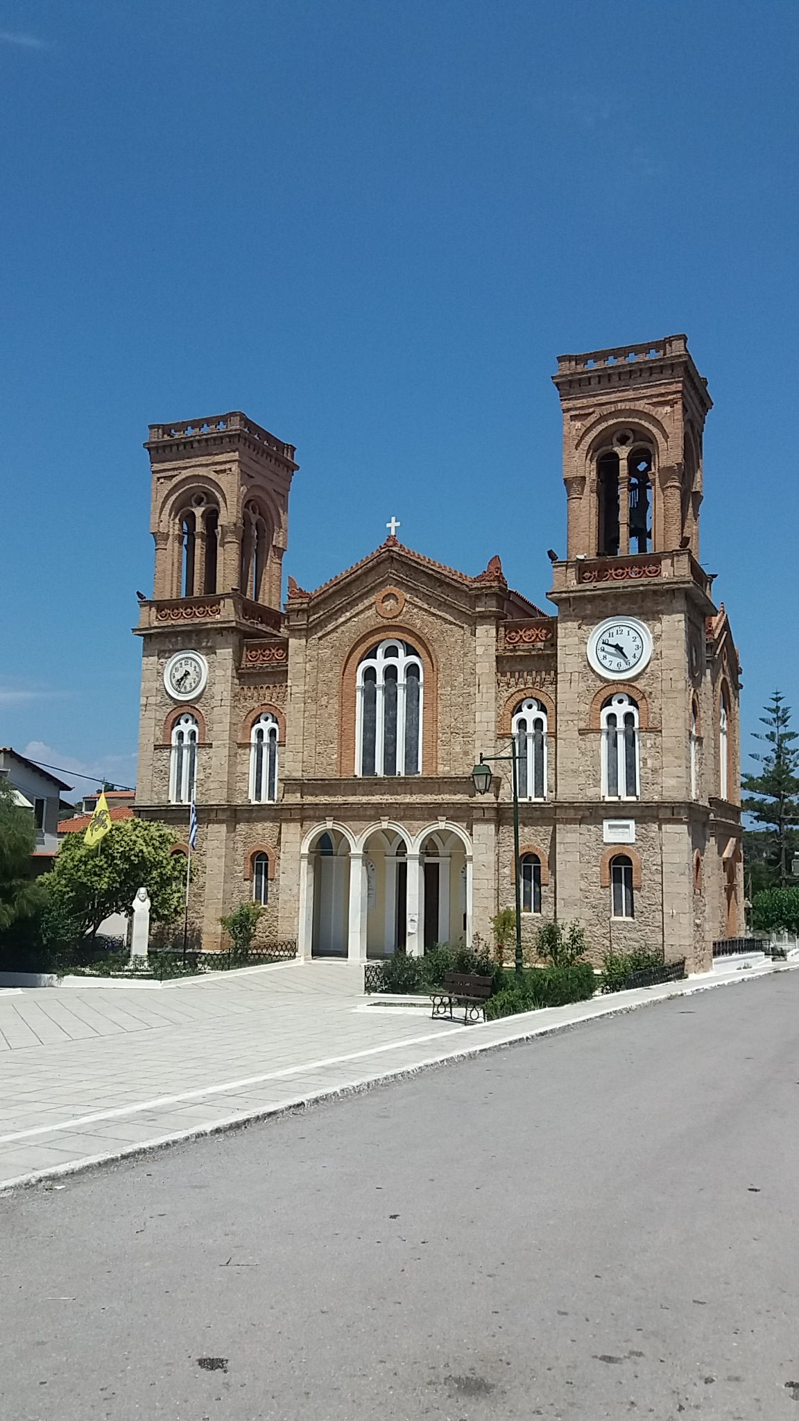 Ναός Αγίου Χαραλάμπους Ακράτας«Ναός Αγίου Χαραλάμπους Ακράτας»